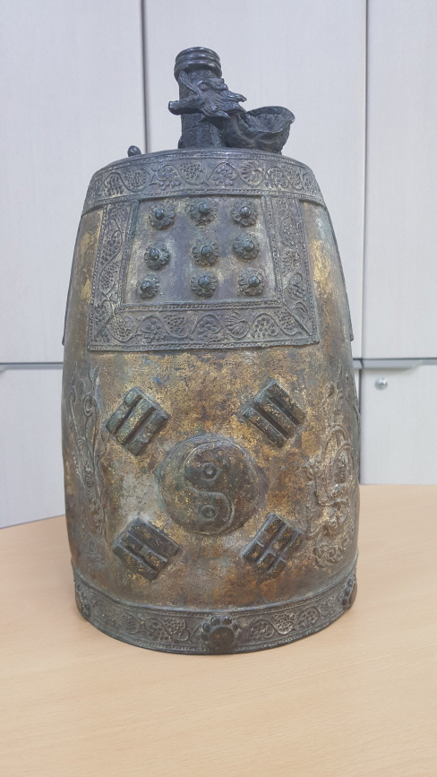 호양학교 동종의 정면